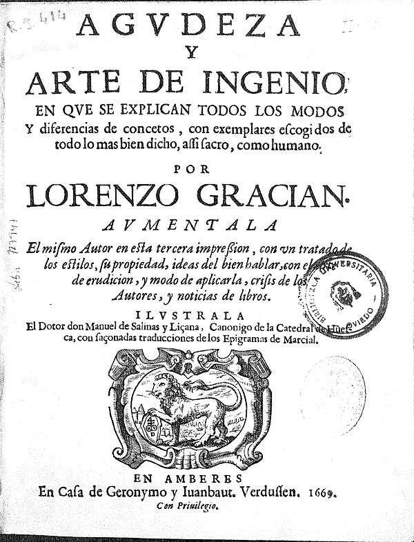 Portada de la “Agudeza y arte de ingenio”, de Baltasar Gracián (Amberes, Verdussen, 1669)